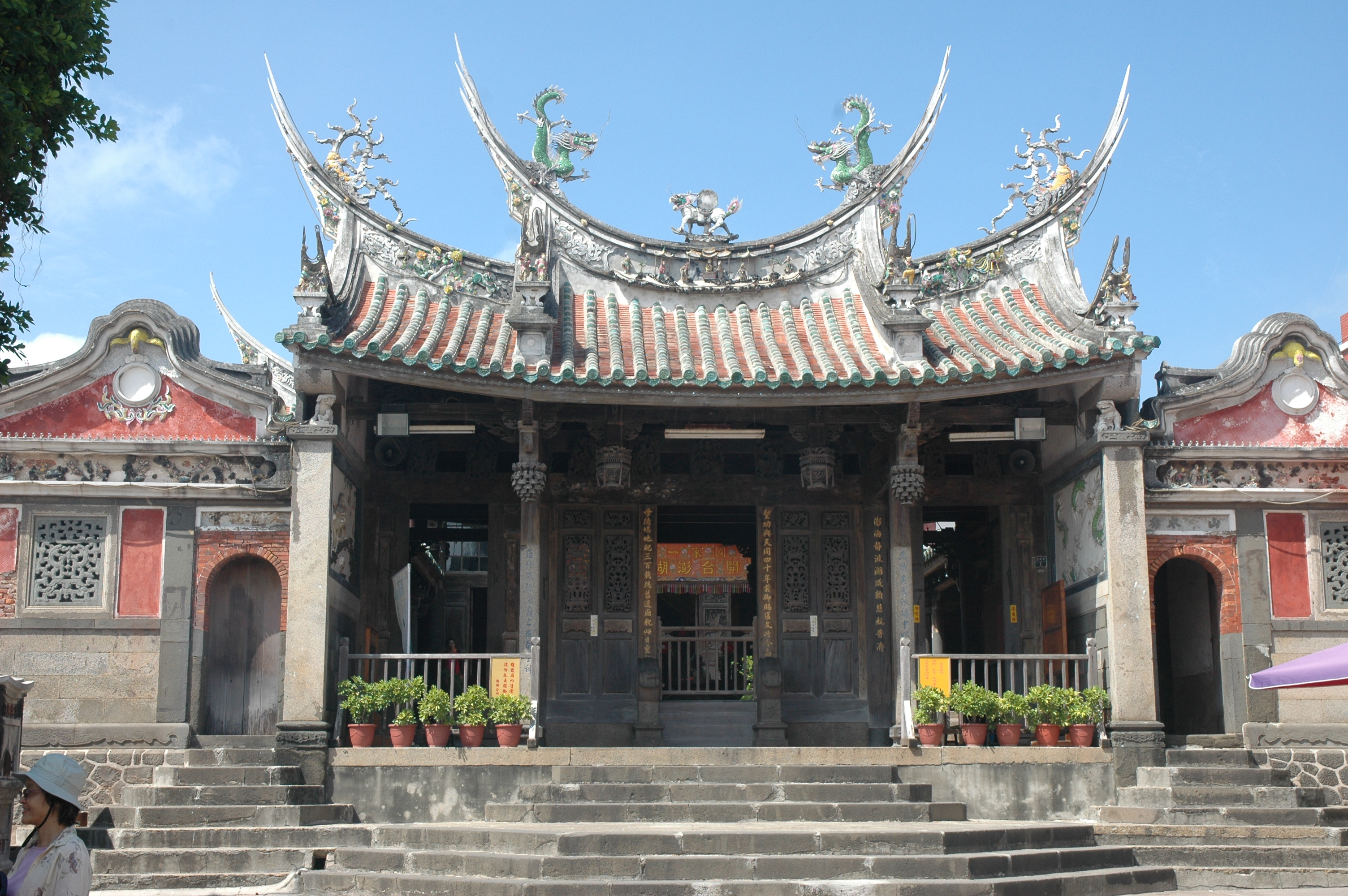 中文（台灣）: 澎湖天后宮